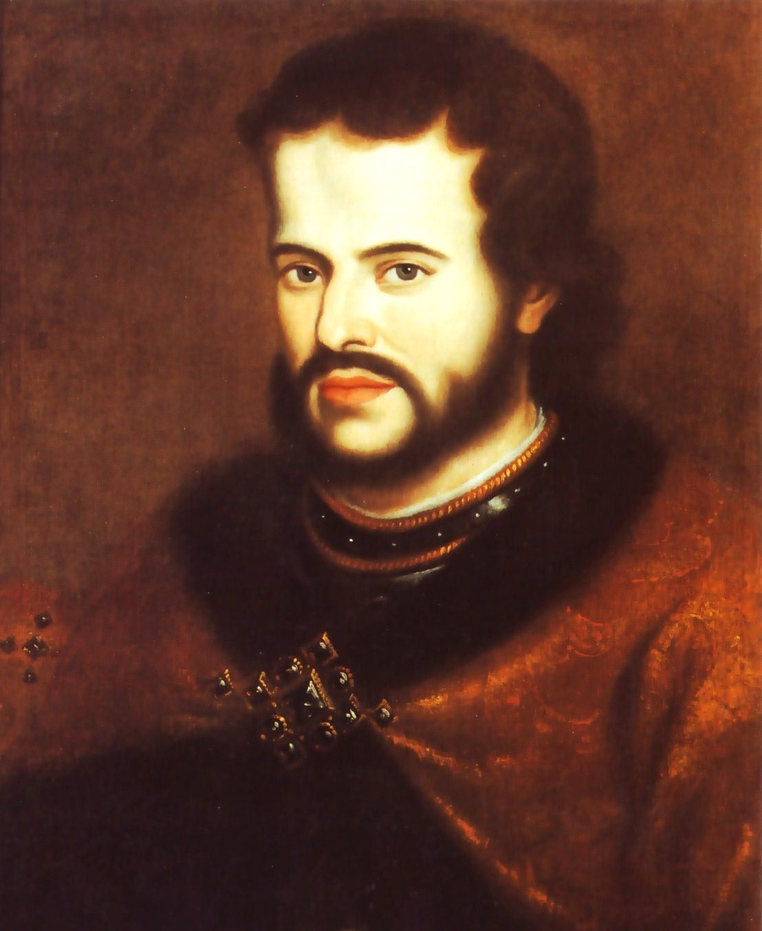 Ivan V of Russia, Kremlin museum. Портрет царя Ивана V, Музеи Московского кремля